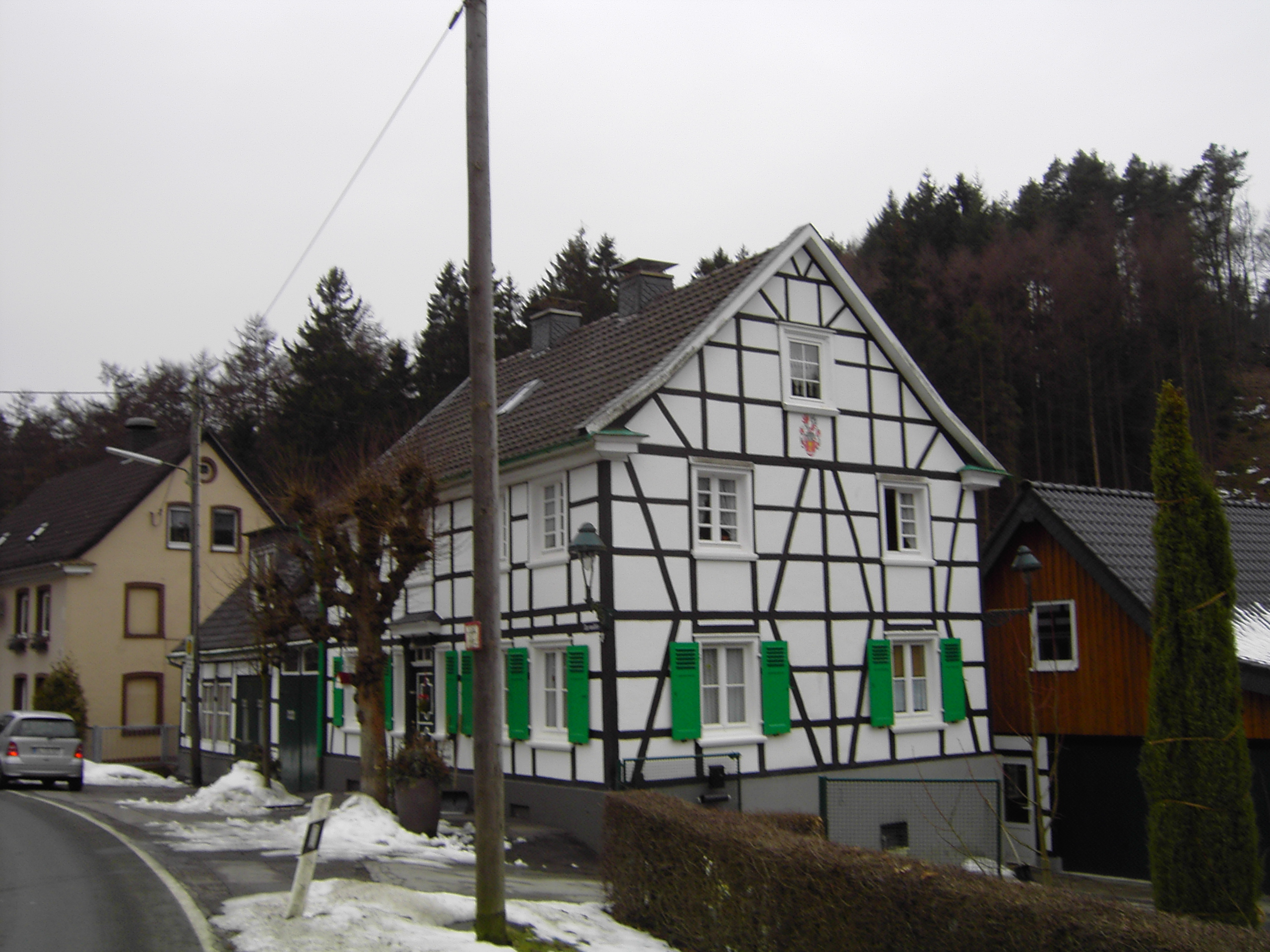 Zurmühle 2010